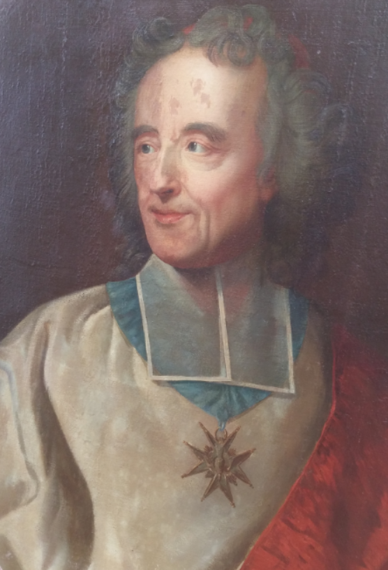 Portrait de Joseph Giry de Saint Cyr